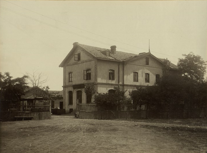 Сапунена фабрика „Солун“ на Бр. Каназиреви (бивша Стоилов & Каназирев) в София. Основана в 1900 г. с основен капитал 2 000 лева, с 1 работник. През 1912 г. е с основен капитал 150 000 лева и 15 работници. Фотоалбум с фотографии на български индустриални предприятия от периода 1887-1912 г., подарен от Съюза на българските индустриалци на цар Фердинанд І по случай 25-годишнината от възшествието му на българския престол.